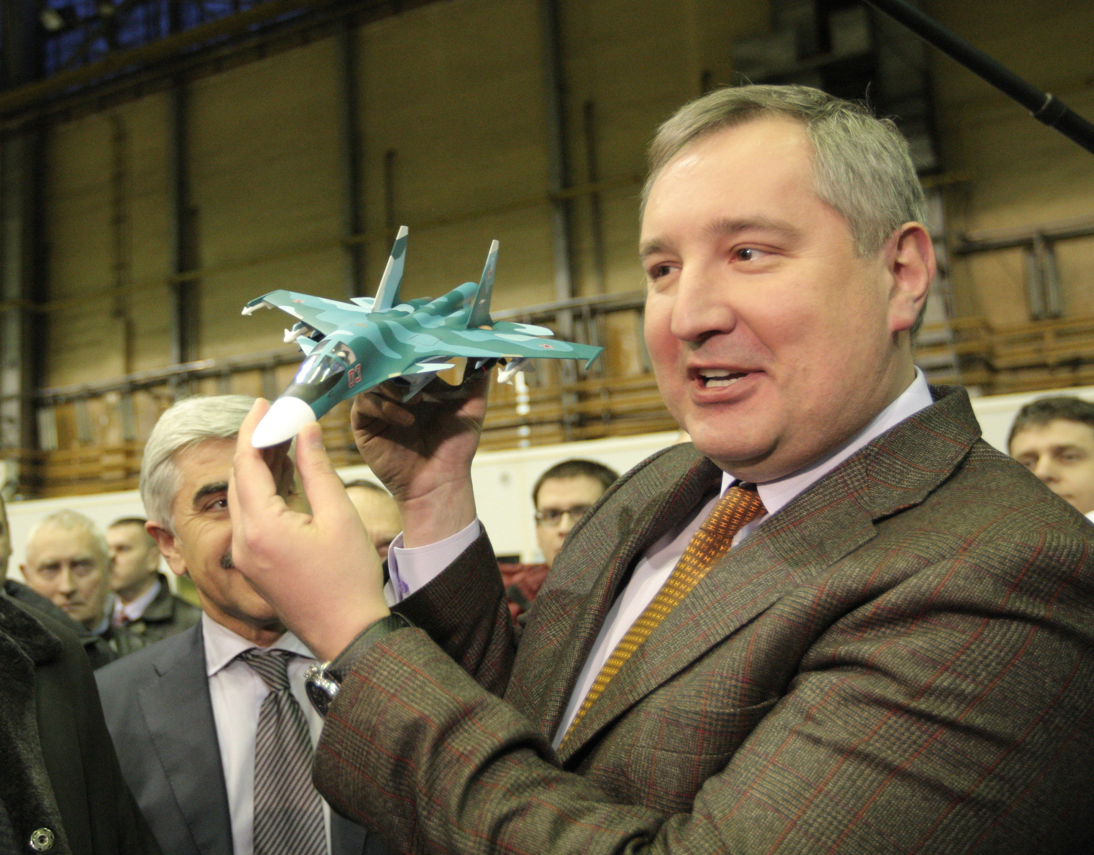 Рабочая поездка Рогозина в Новосибирск. Посещение завода ОАО НАПО им В.П.Чкалова. Здесь собирают "Sukhoi Superjet 100" и СУ 34.